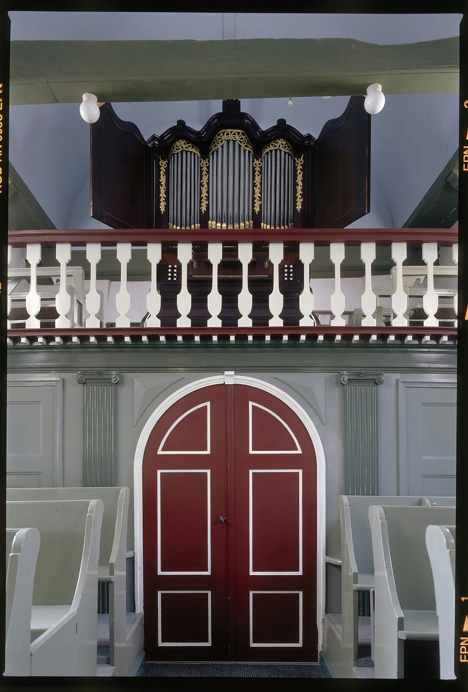 Nederlands Hervormde Kerk: Interieur, overzicht orgel en ingangspartij, orgelnummer 460 (opmerking: Gefotografeerd voor Het Historische Orgel in Nederland 1769-1790)